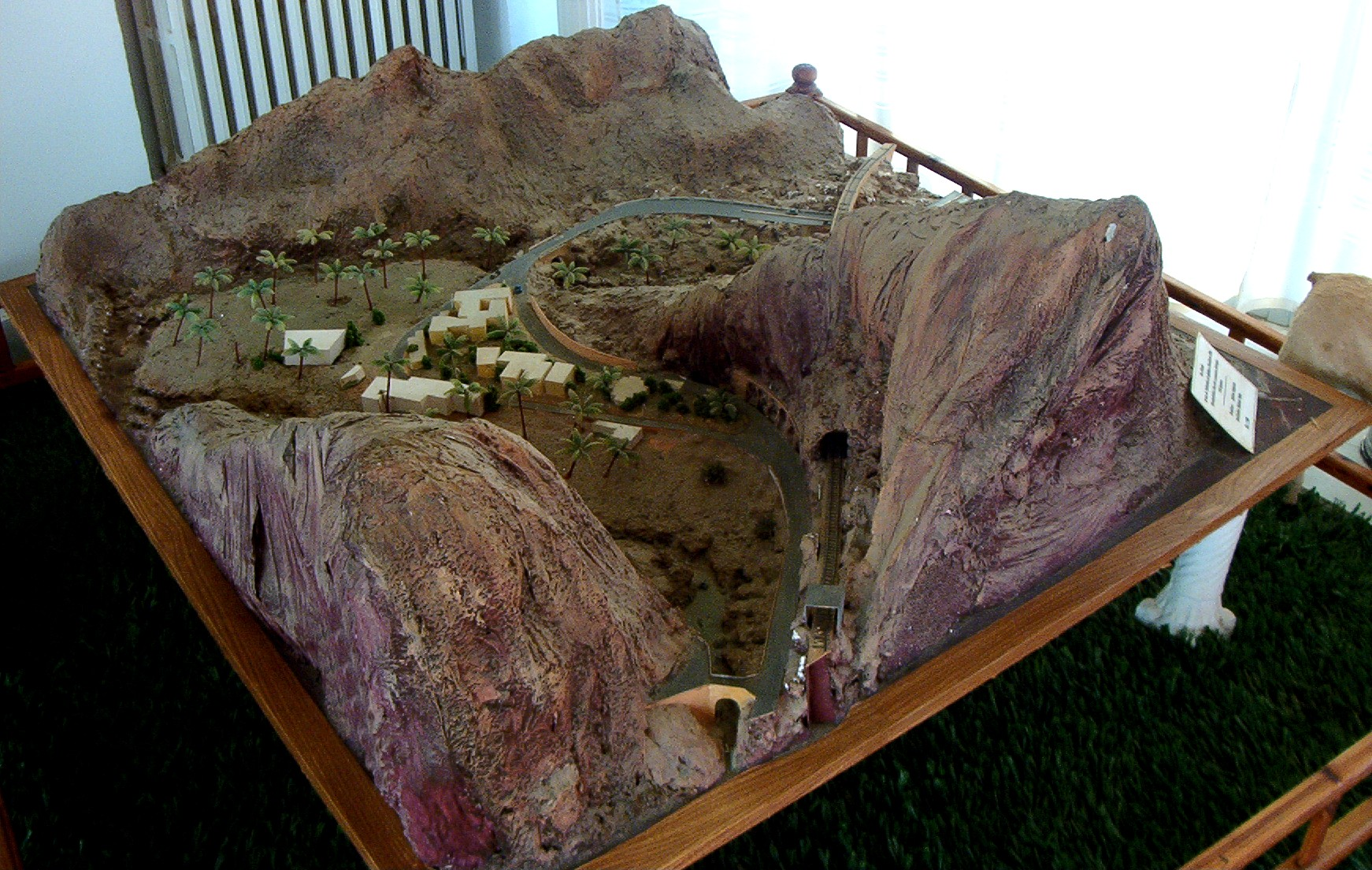 Maquette des Gorges d'El Kantara en Algérie.